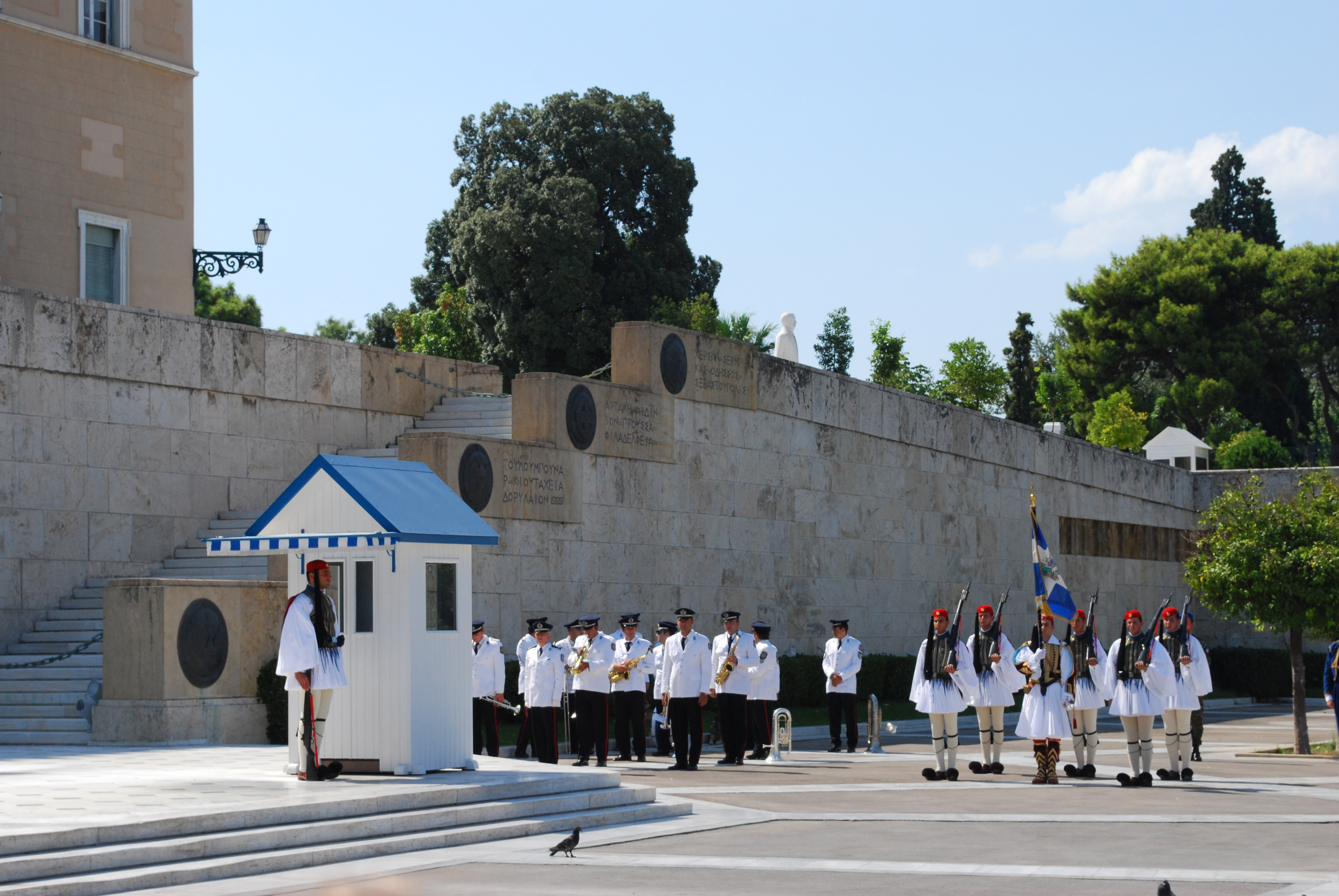 La relève de la garde au parlement grec, le dimanche 2 août 2009, à Athènes.